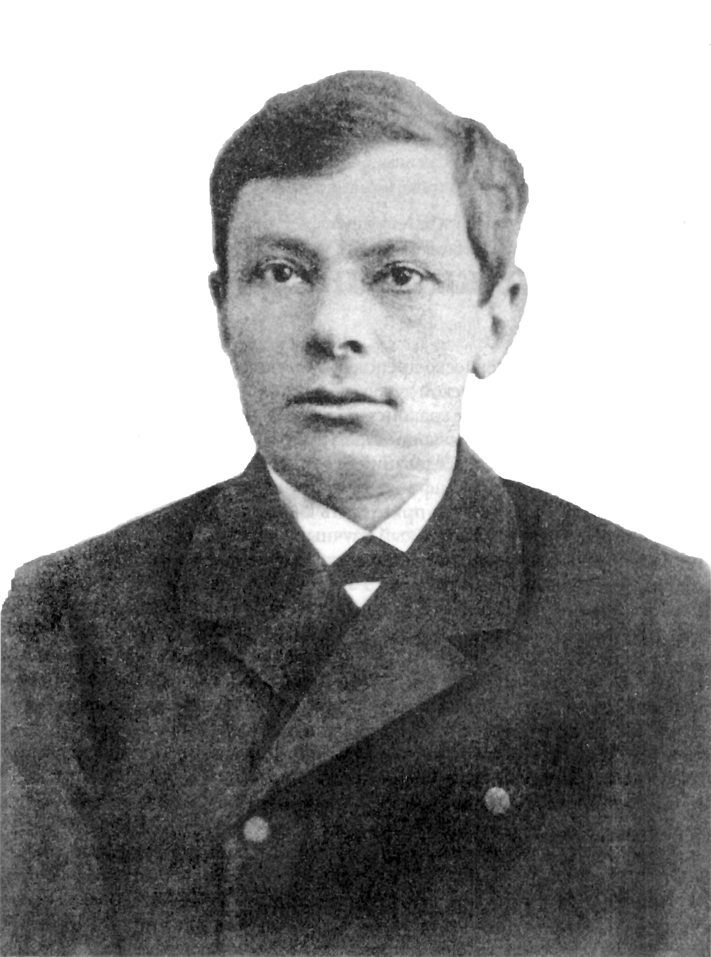 Василий Васильевич Болотов (1853-1900)